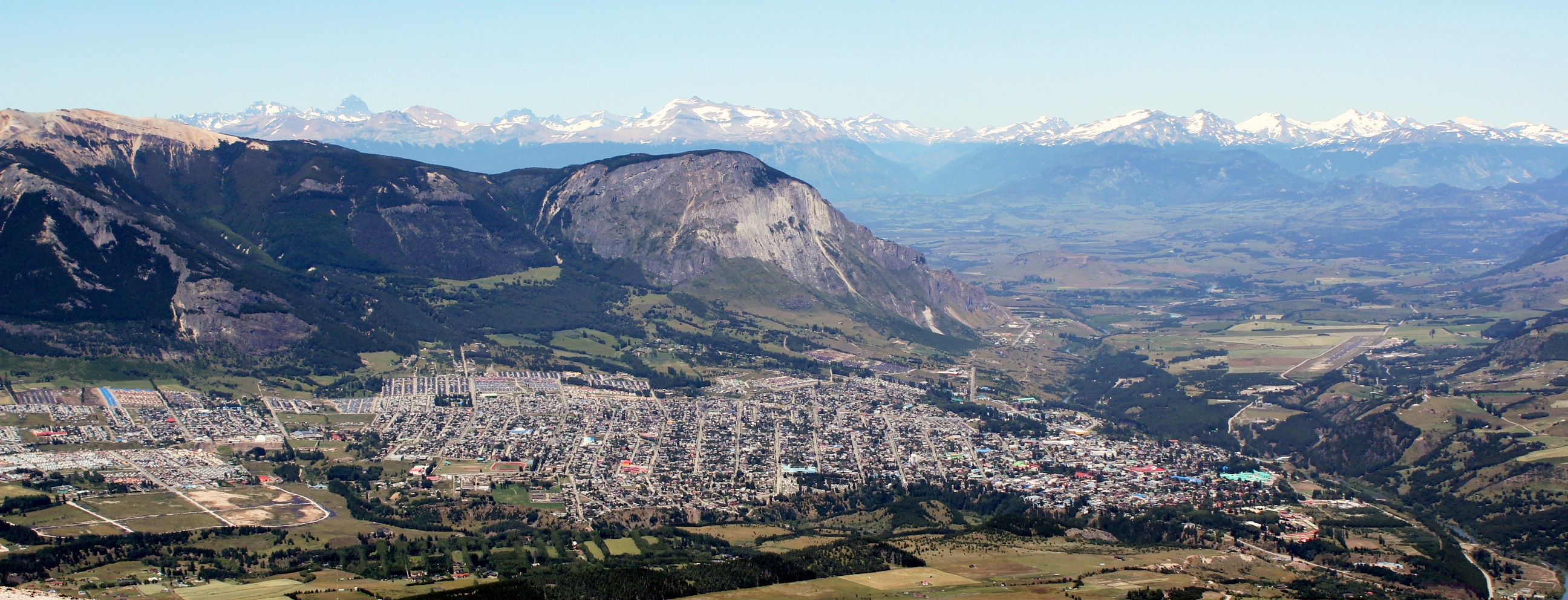 Vista panorámica de la Ciudad de Coyhaique, en la Región de Aysén, Chile. Tomada desde el Cerro Cinchao.